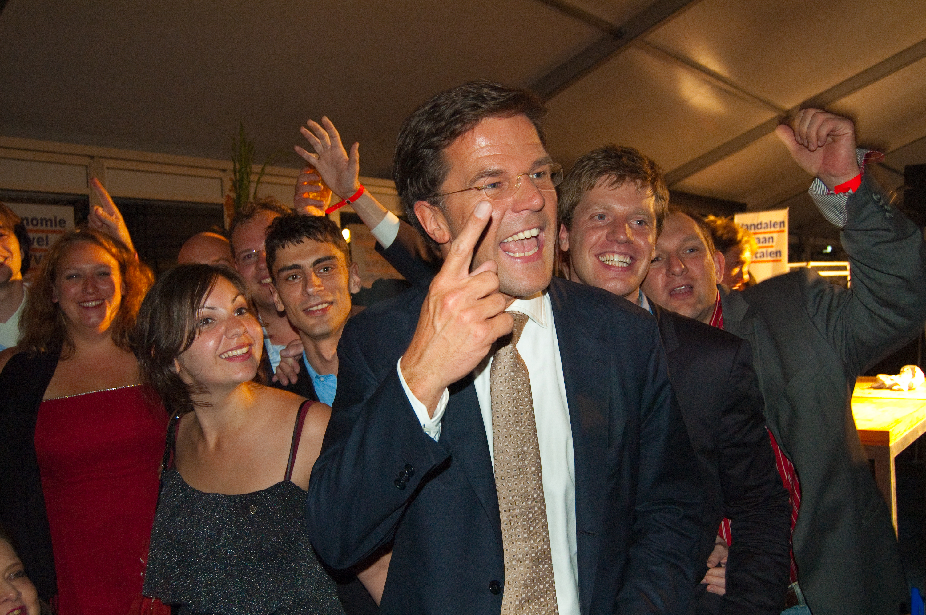 Mark Rutte en de best-vertegenwoordigde VVD afdeling op het Scheveningse feest (die van Leiden dus).